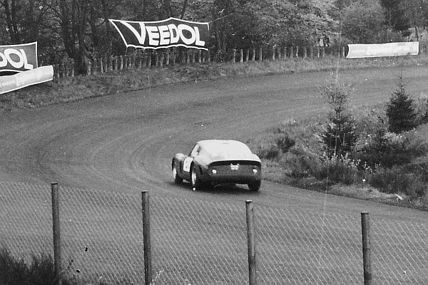 1000-km-Rennen auf dem Nürburgring 1962. Ferrari GTO mit 4-Liter-Motor von Mairesse/Parkes in der Südkehre. Eigenes Foto, von altem Papierbild gescannt